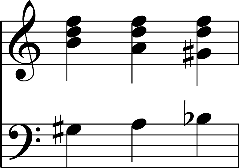 Demonstratives Notenbeispiel, selbst angefertigt